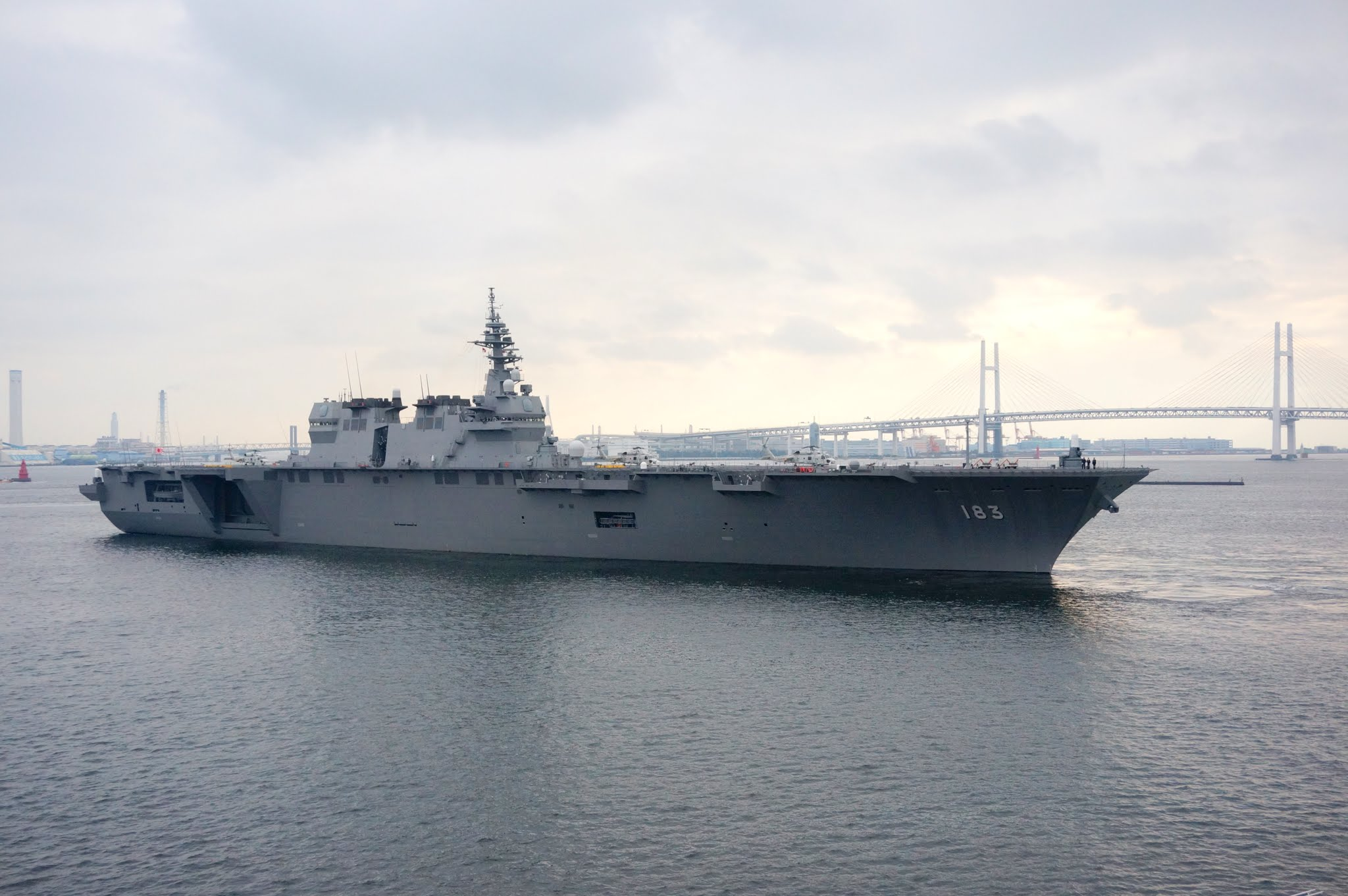 平成27年度自衛隊観艦式に参加するため横浜・大桟橋を出港する護衛艦いずも。